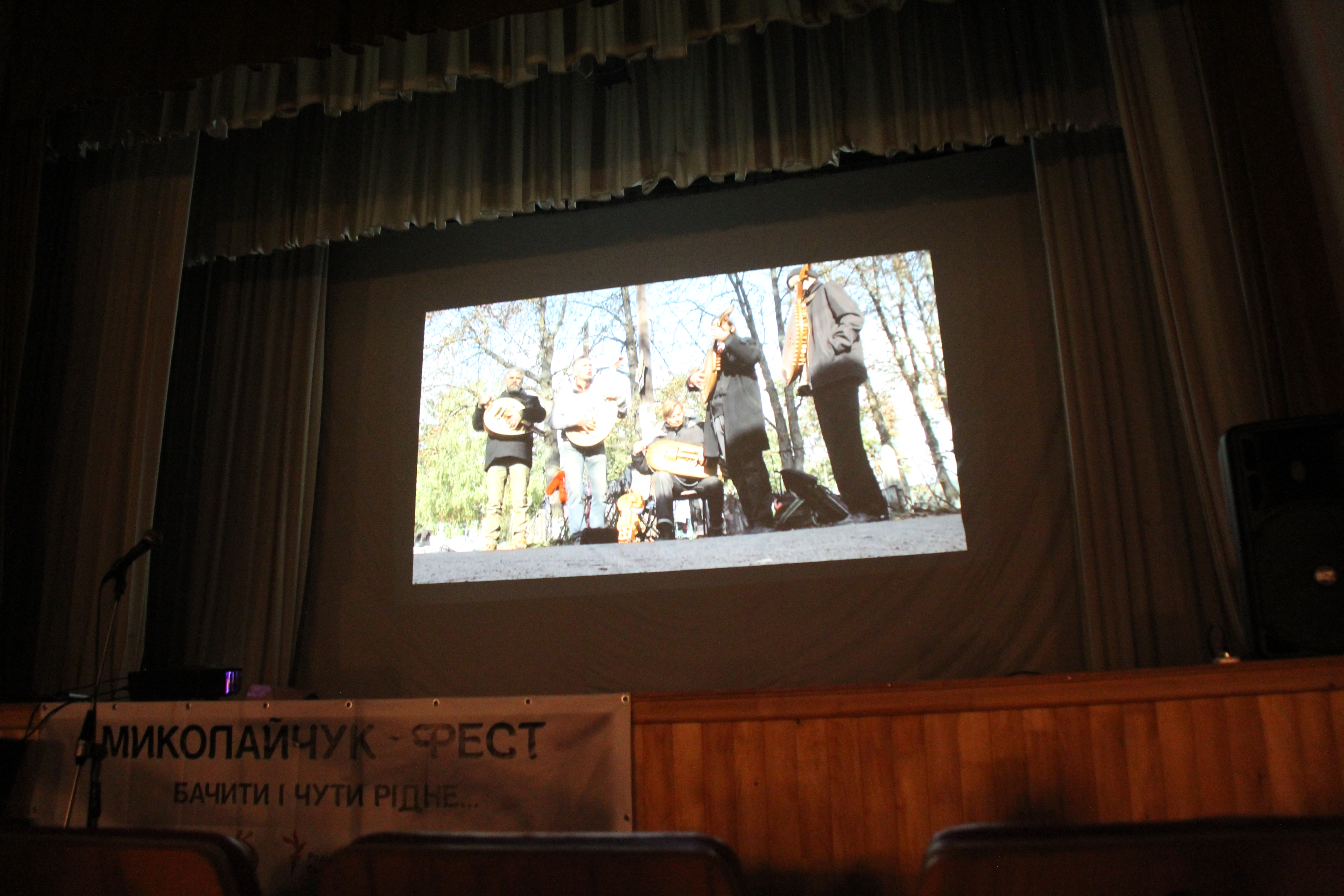 Показ фільму Ганни Яровенко Вільні люди.